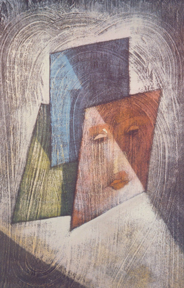 פן אחד לשלוש מידות טכניקת גריזיי 1987 עמיקם בר גרמא